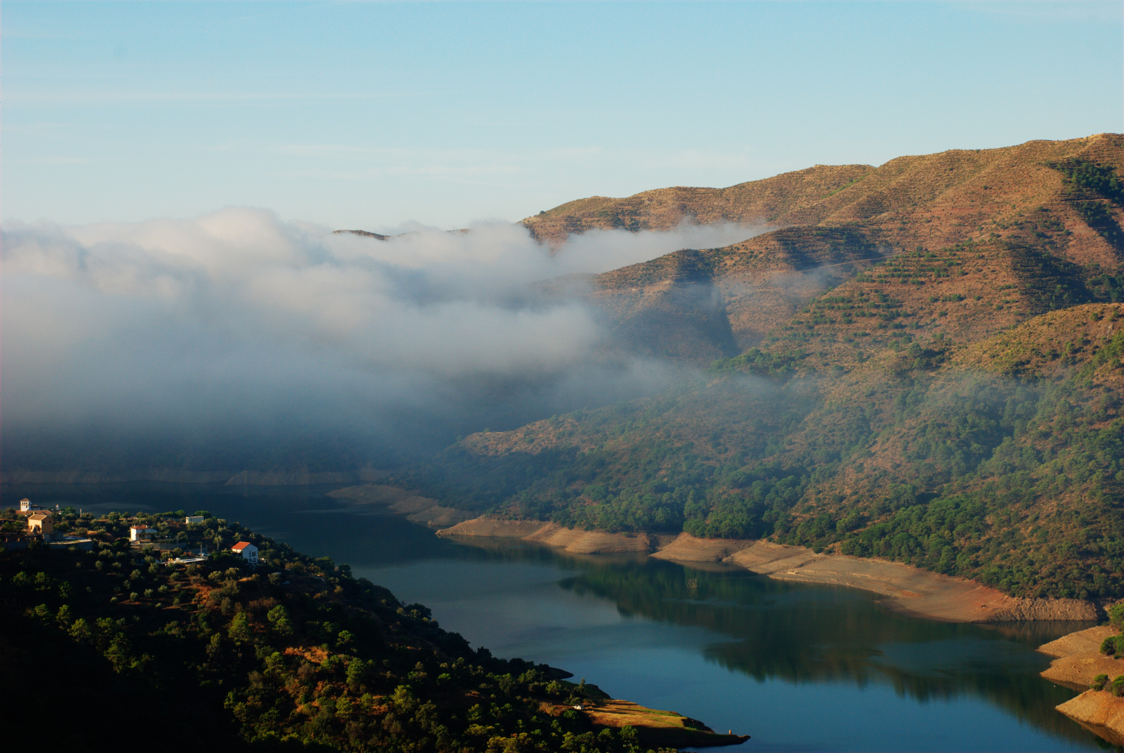 Embalse de Río Verde, Marbella, España